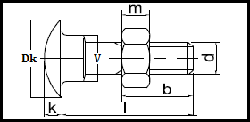 ISO 8677